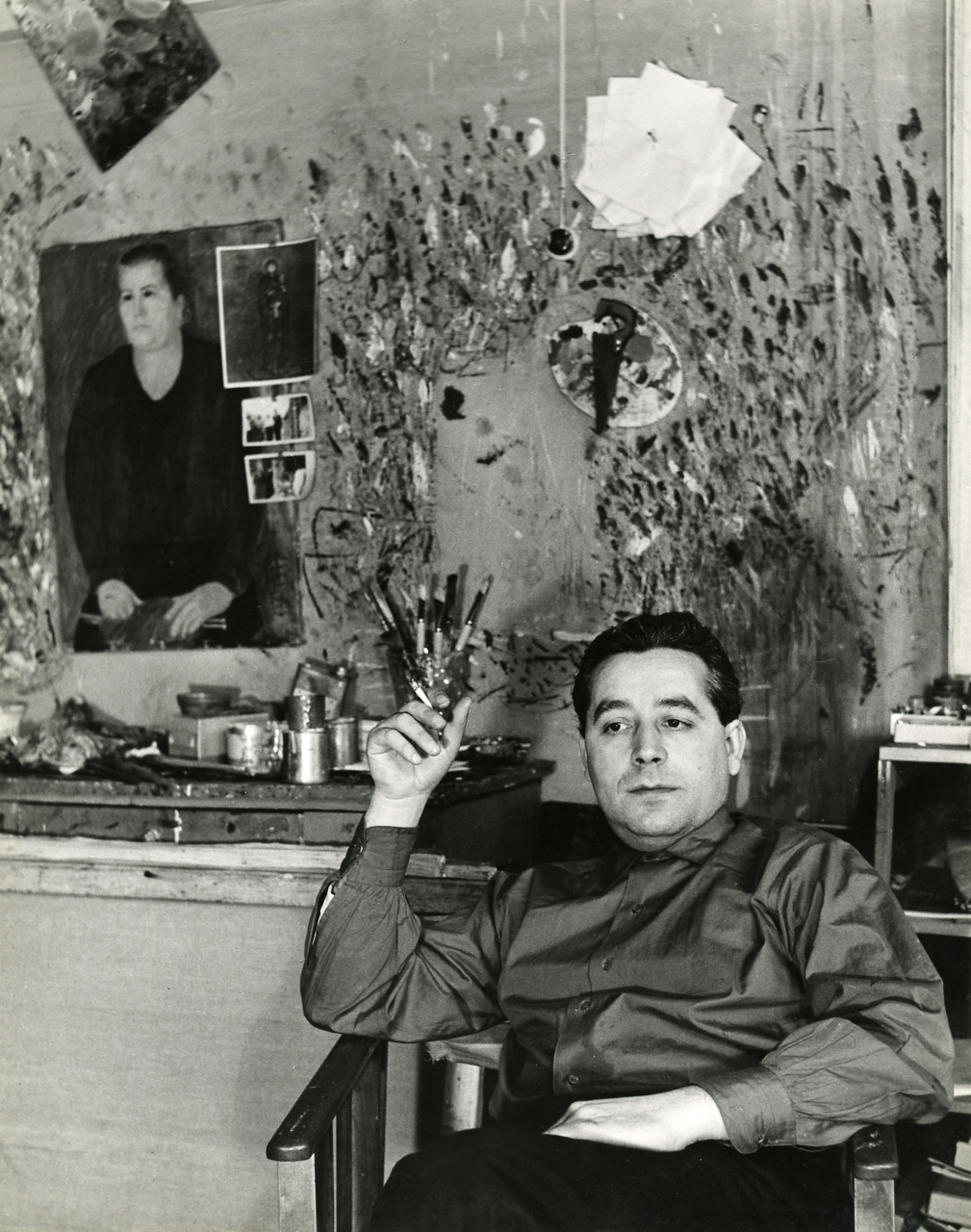 Servizio fotografico : Milano, 1958 / Paolo Monti. - Stampe: 2 : Positivo b/n, gelatina bromuro d'argento/ carta, 30x40. - ((Al verso delle stampe iscrizioni didascaliche e documentarie manoscritte a matita: "Il pittore Cassinari/ 1958"; timbro a inchiostro con copyright (Corso Sempione - Milano). - Sul coperchio della scatola iscrizione didascalica manoscritta a pennarello nero: "Ritratti - Figure ambientate". - Partecipazione ad una mostra con stampa b/n 30x40 cm, intitolata "Il pittore/ Capogrossi" (cfr. timbri al verso: "2eme Biennale/ Mediterranéènne/ photo - Cinema/ Nice 1957", "Bordeaux 1955", e di una mostra greca: "Circolo Fotografico 'La Gondola' ").